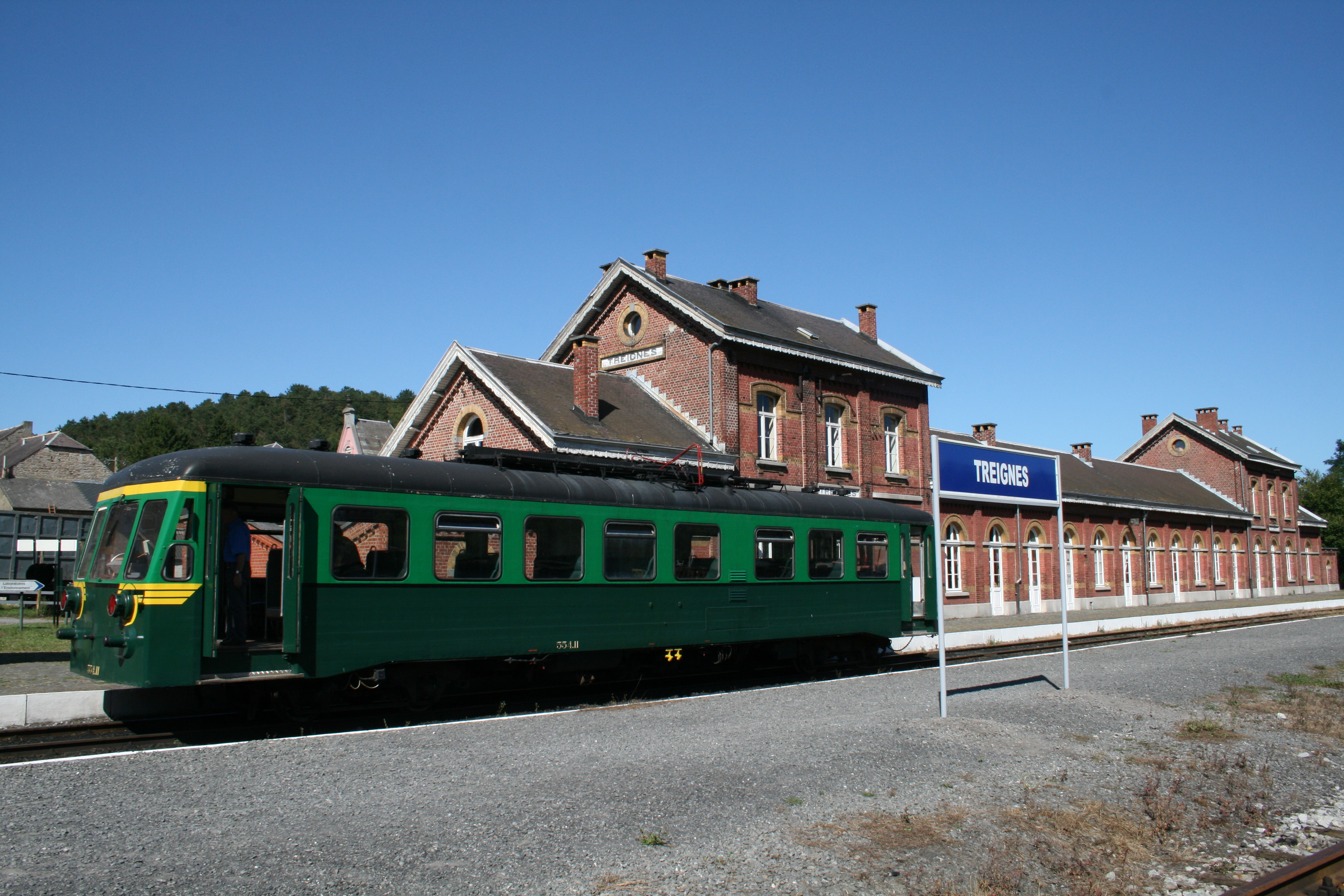 Treignes (Belgique) - Autorail diesel 554.11 à l'arrêt en gare de Treignes (terminus de la ligne touristique du Chemin de Fer à Vapeur des 3 Vallées).